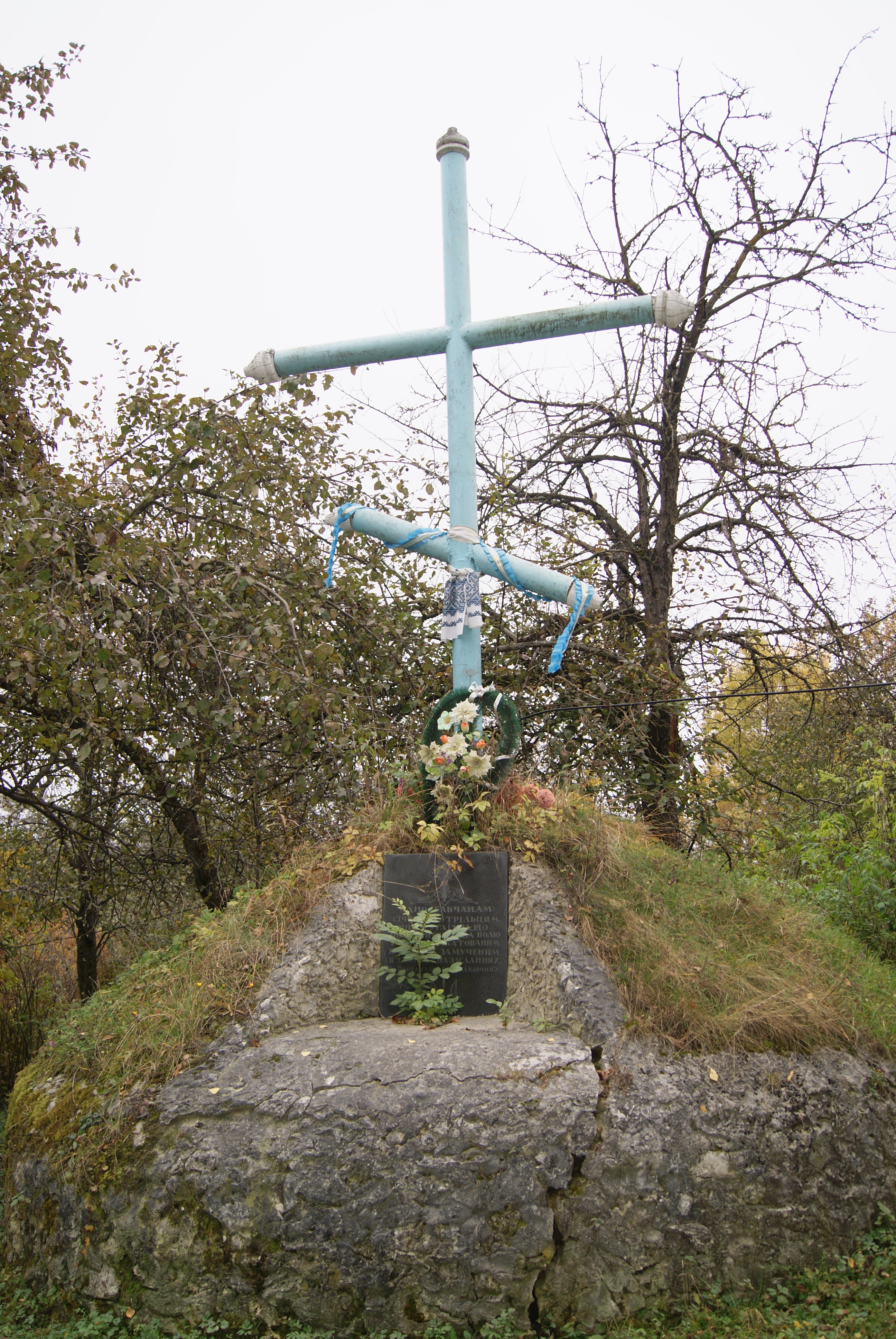 Хрест односельцям у с. Старому Олексинці Кременецького району Тернопільської области.